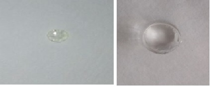 Құрғақ және суда ісінген Поливинилпирролидон (ПВПД)- гидрогелінің үлгілері